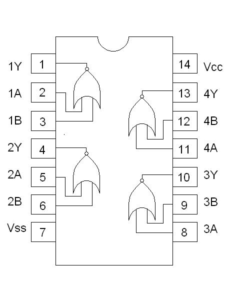 74HC02-piirin pinnijärjestys